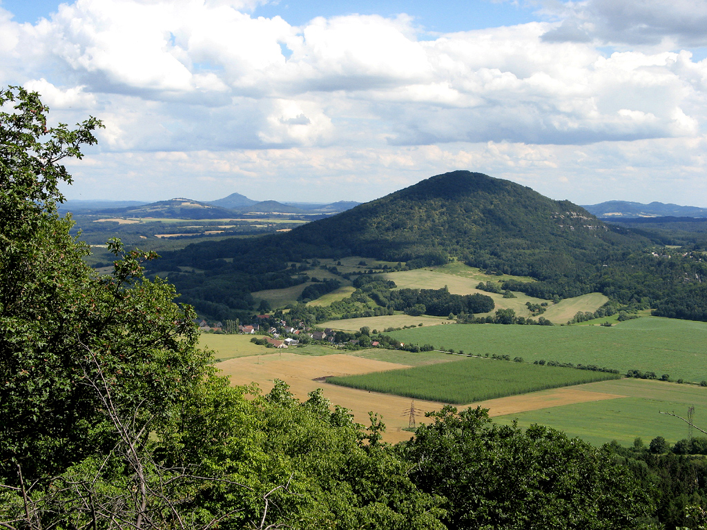 Výlet na Vlho%u0161%u0165 a Ronov 24. 6. 2007